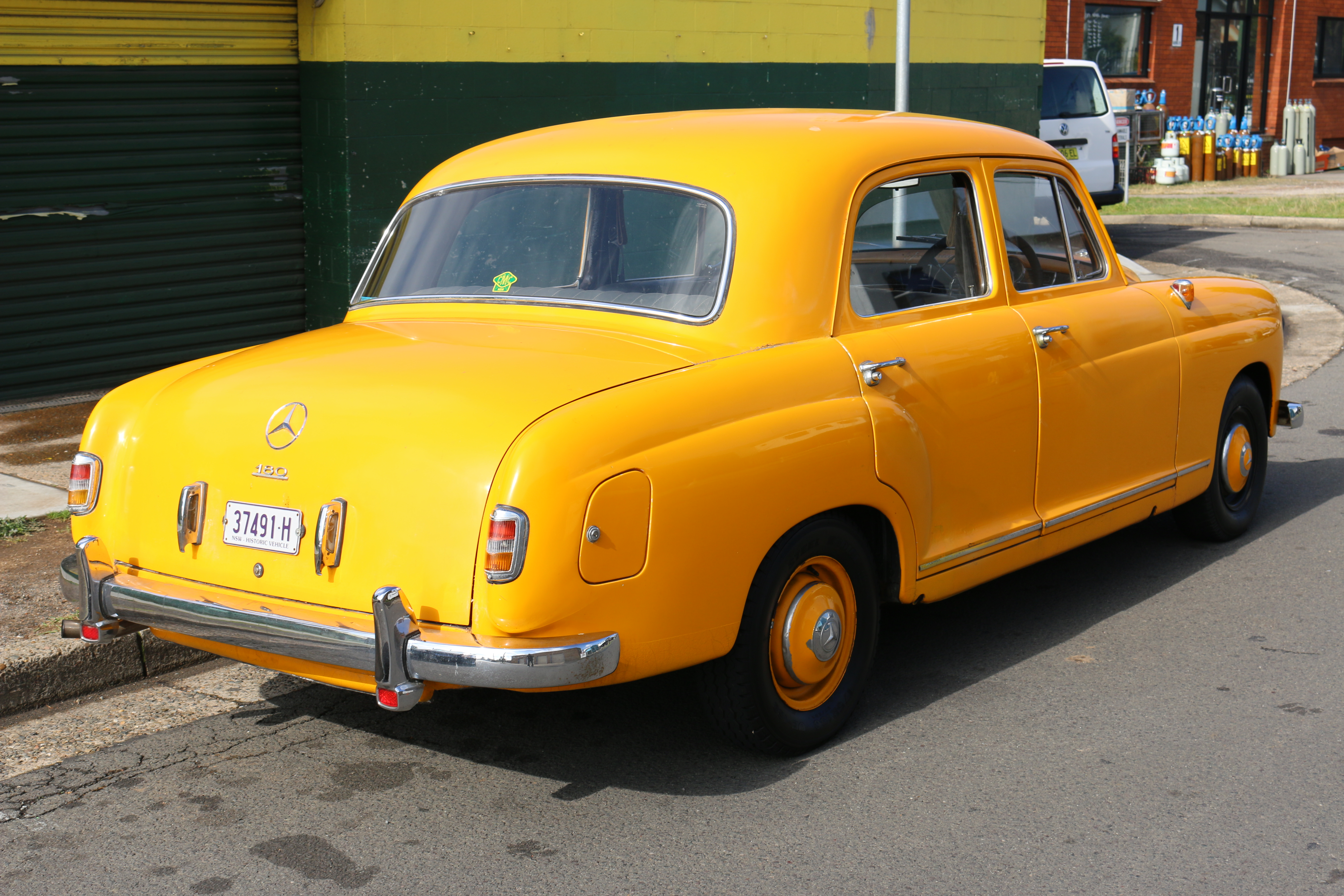 Mercedes Benz W120 180